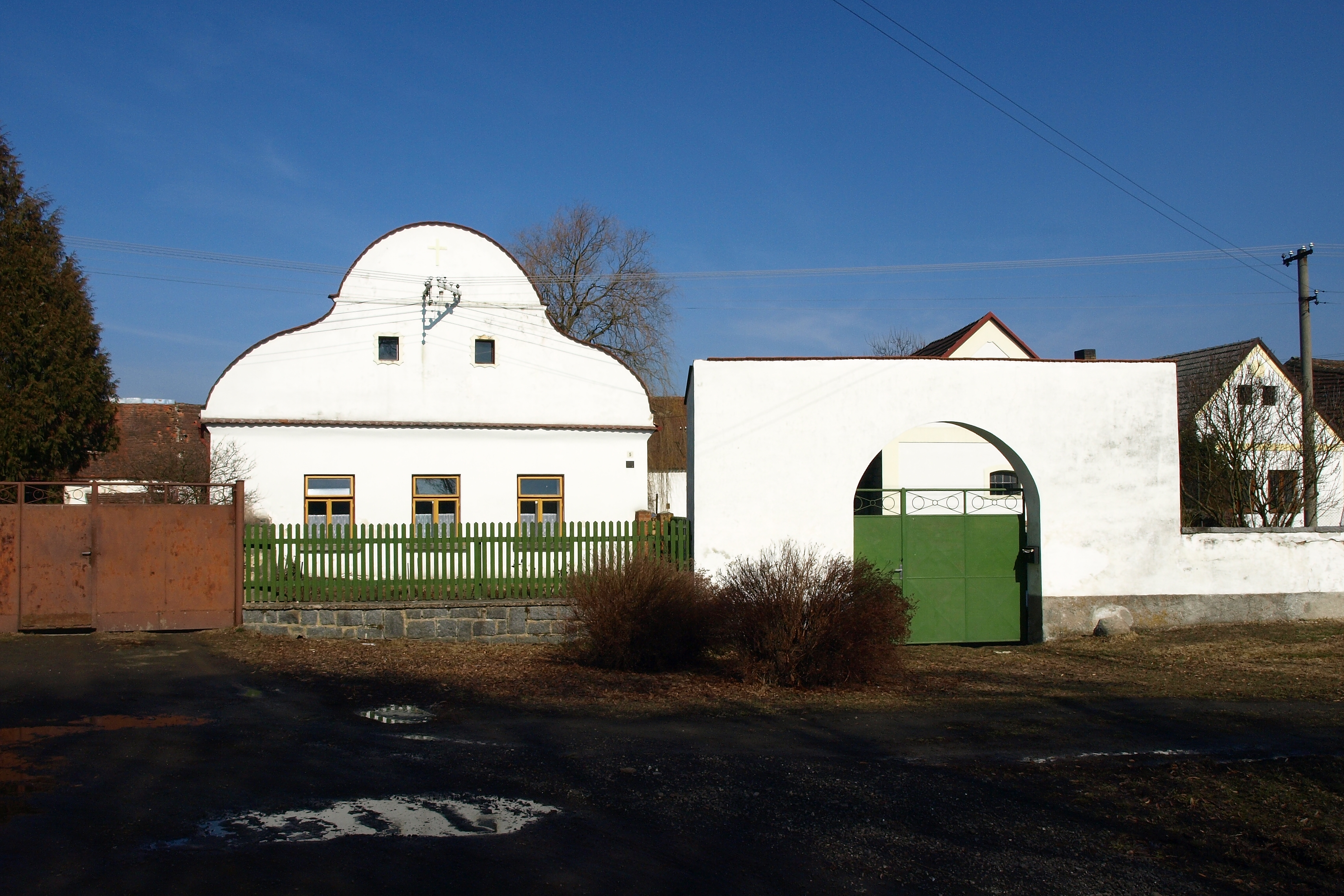 Olšany